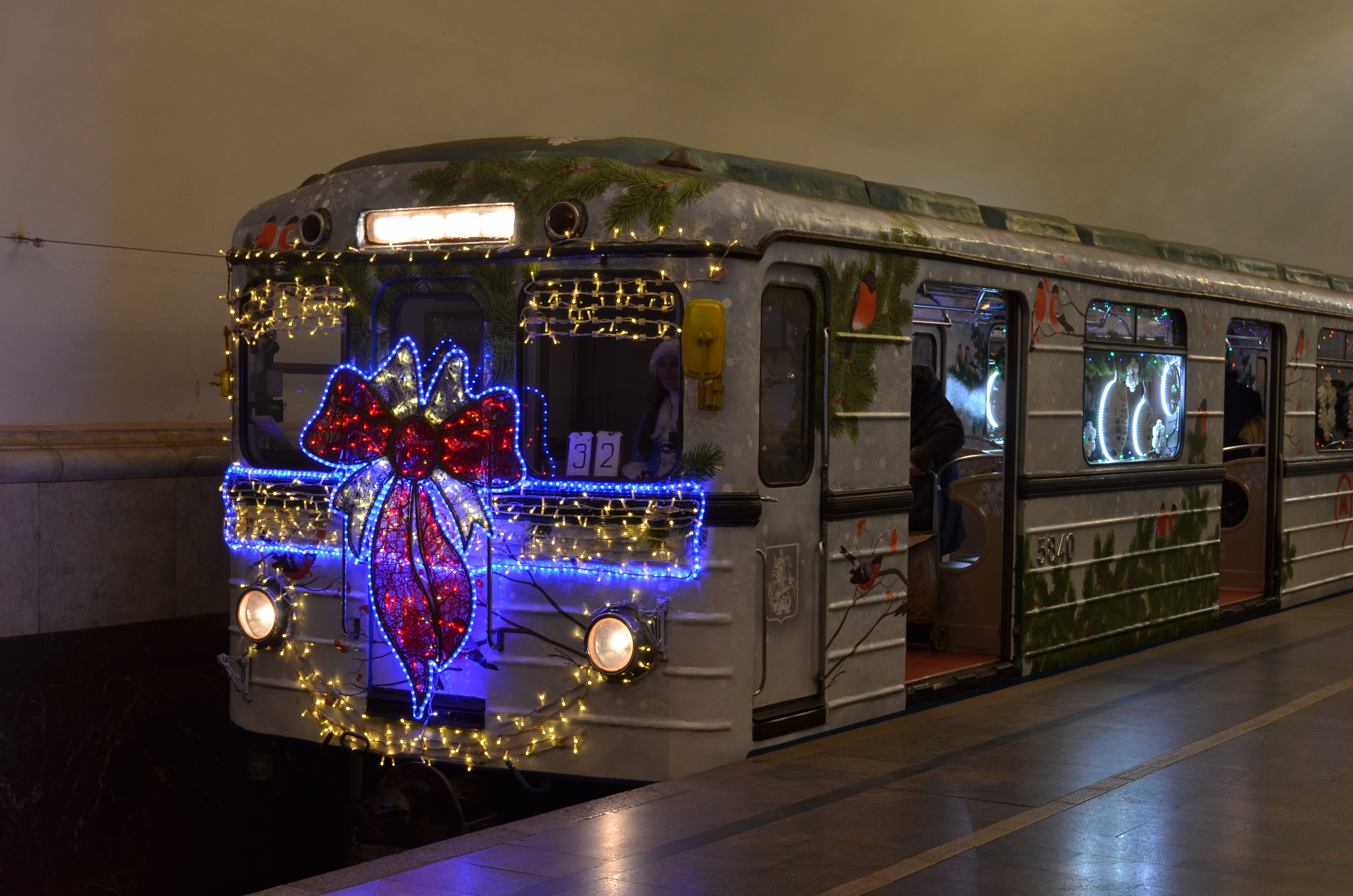 «Новогодний поезд» на станции «Курская». 3 января 2017 года осуществлял движение против часовой стрелки на Кольцевой линии. P.S. Немного темновато (хотя цвета "морды" поезда реальные). Есть NEF-ка, чтобы улучшить.